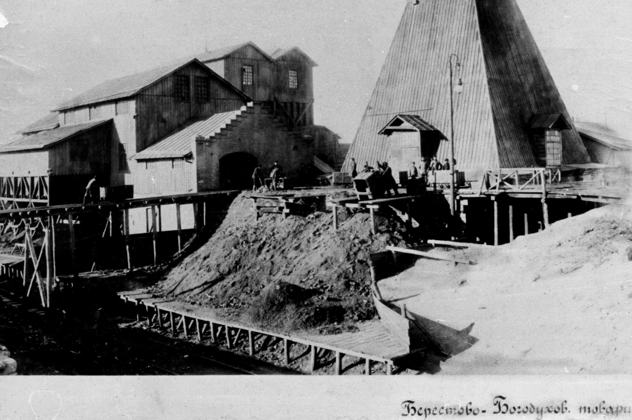 Берестово-Богодуховский каменноугольный рудник